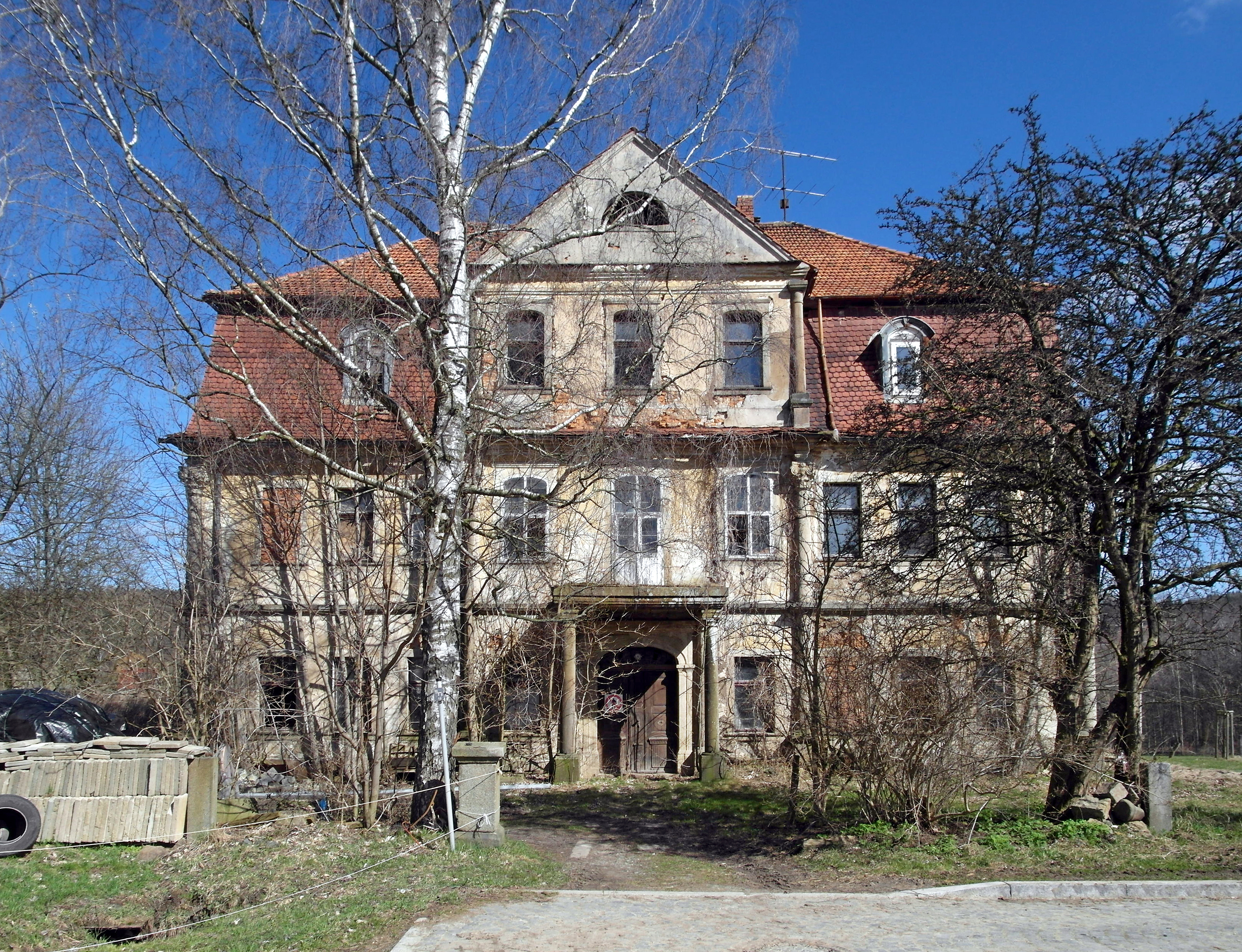 26.03.2017 02708 Schönbach, Niederdorfstr. 46 (Hofeweg): Schloß von Süden. Das Schloß wurde 1821/22 unter Friedrich Wilhelm Degner im späten Barockstil errichtet. Granitsäulen mit Kapitellen betonen die Ecken und den Portikus. In der DDR wurde das Schloß als Wohnhaus genutzt. Schon längere Zeit steht es nun leer und verfällt. [SAM8580.JPG]20170326120DR.JPG(c)Blobelt